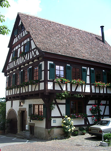 Weingärtnerhaus Bietigheim-Bissingen, Bei der Kelter 3